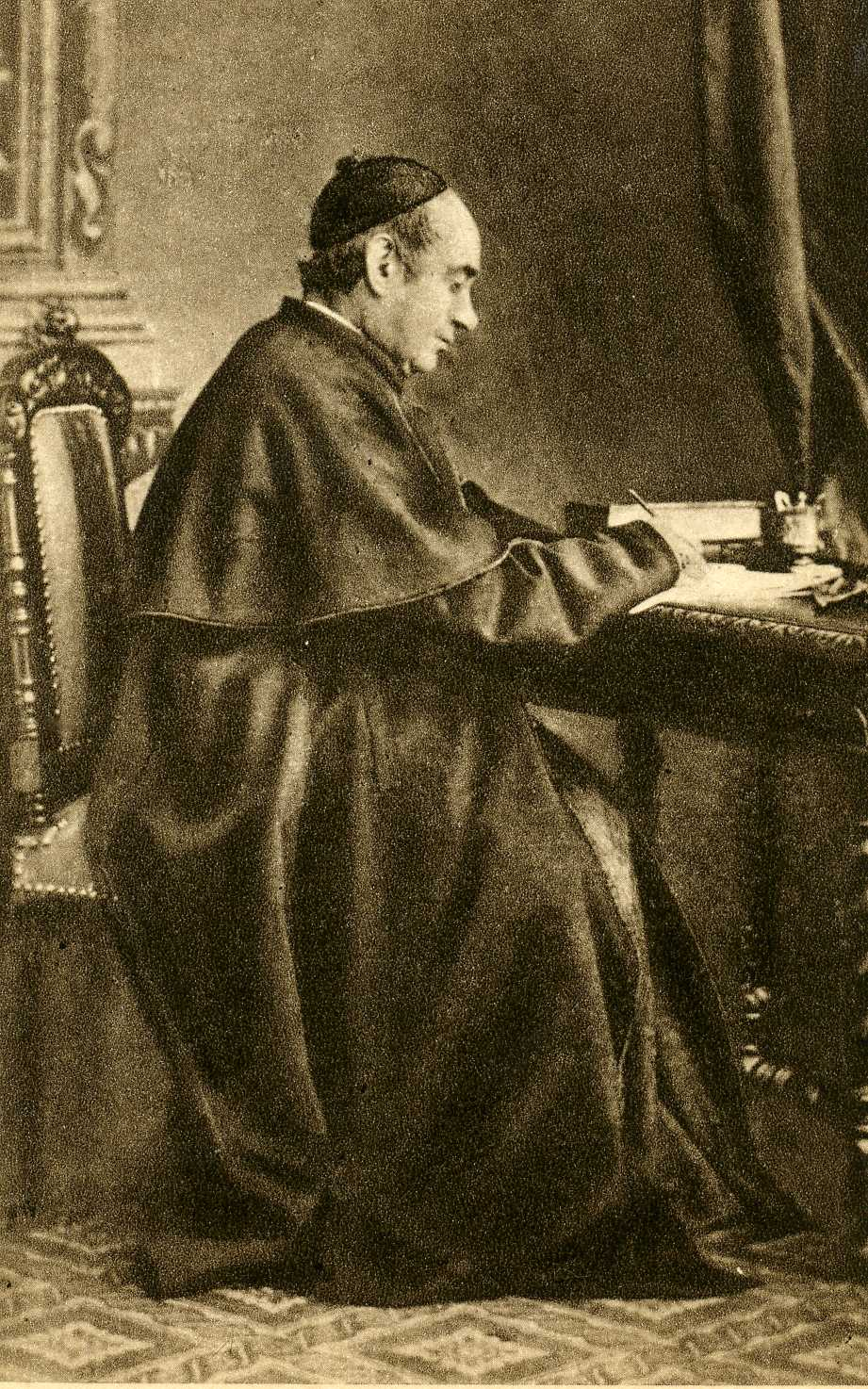 Foto del P. Claret escribiendo. A. Trinquarts, París, 1868.